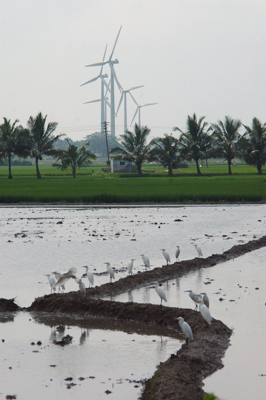 Paddies and wind turbines in India